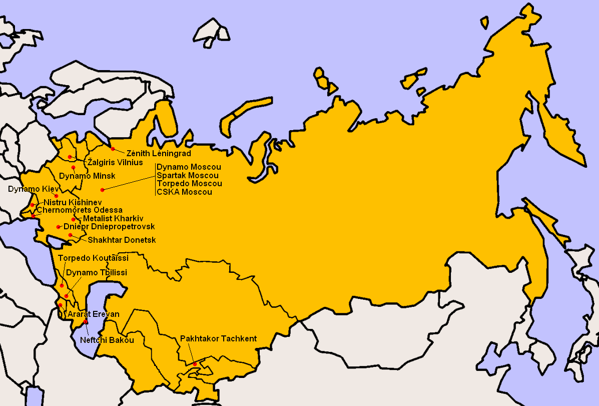 Clubs participants à la Division Supérieure 1983.